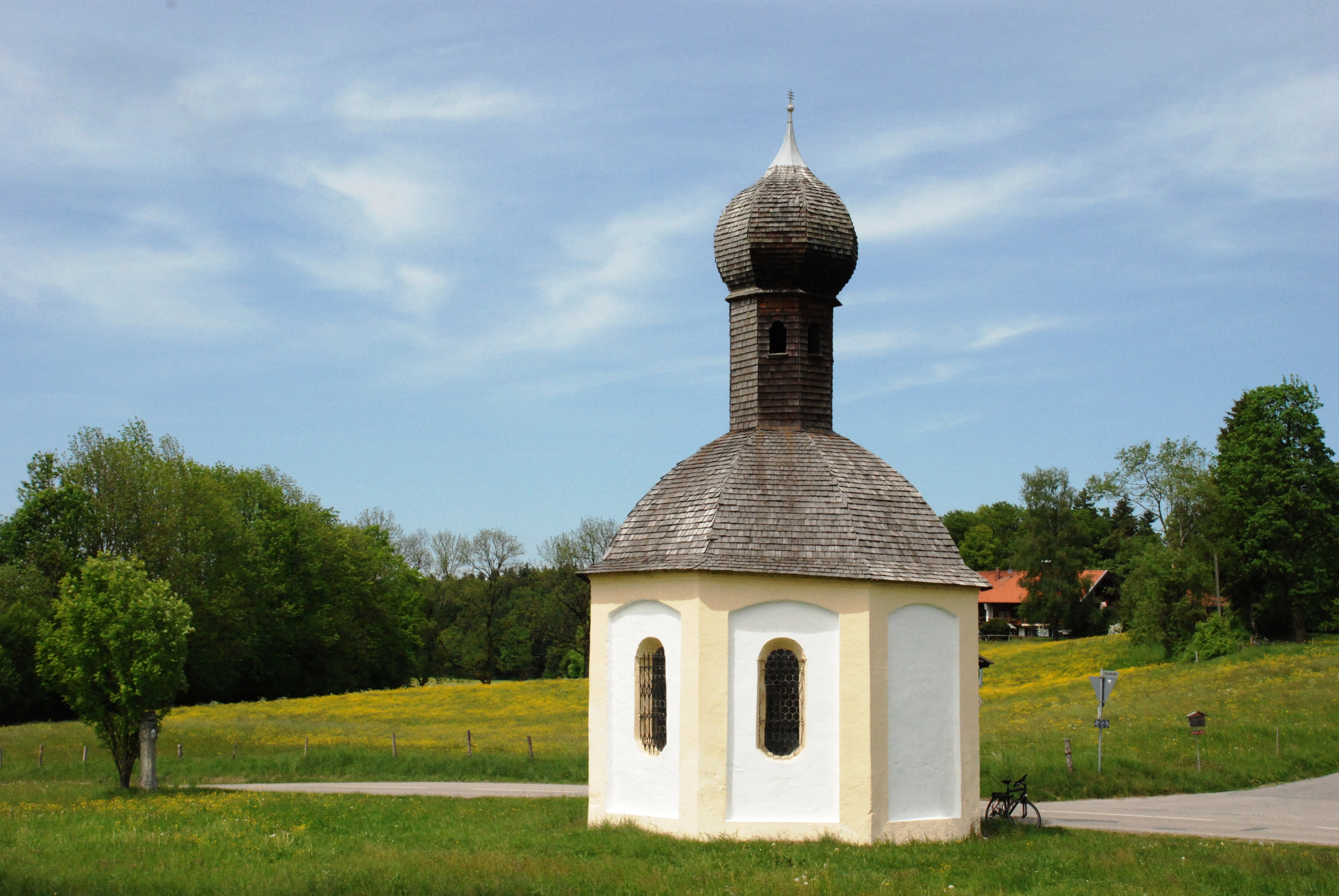 Katholische Kapelle St. Sylvester, sogenanntes Freikirchl, in Hirschstätt nahe Schaftlach, Gemeinde Waakirchen, Landkreis Miesbach, Regierungsbezirk Oberbayern, Bayern. Als Baudenkmal in der Bayerischen Denkmalliste aufgeführt.